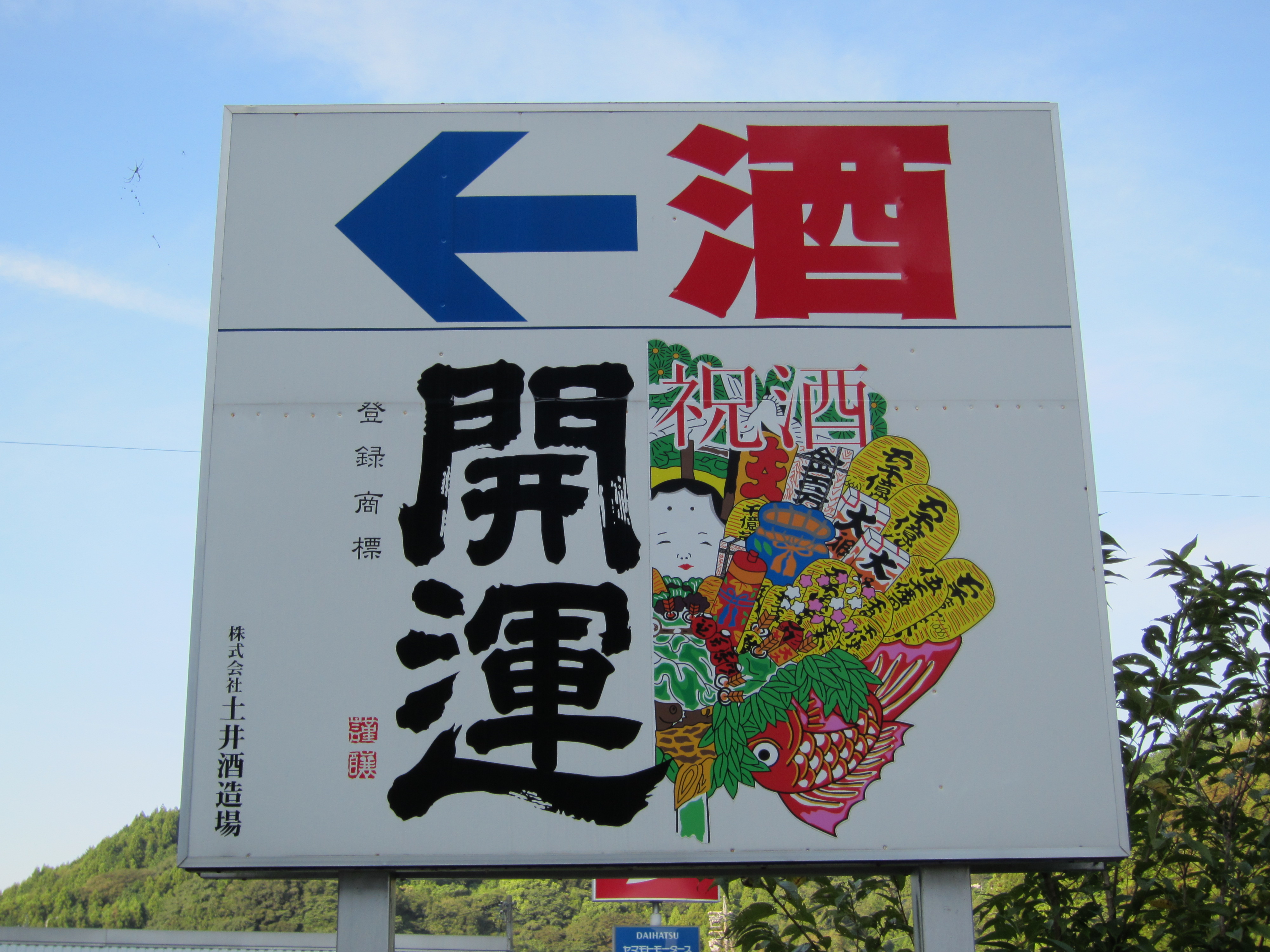 Yasaka, Kakegawa, Shizuoka Prefecture 436-0004, Japan